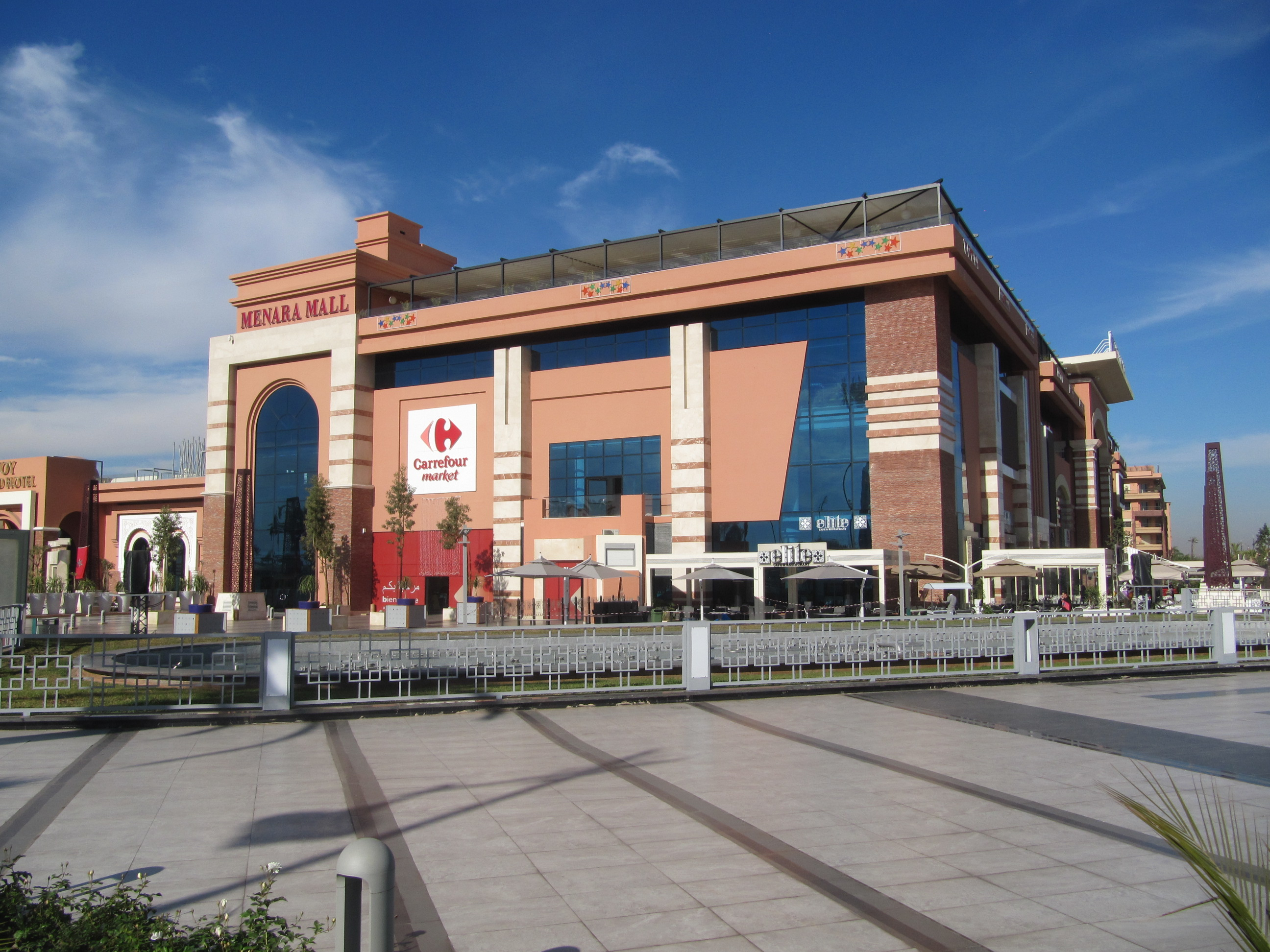 Menara Mall, Marrakesh